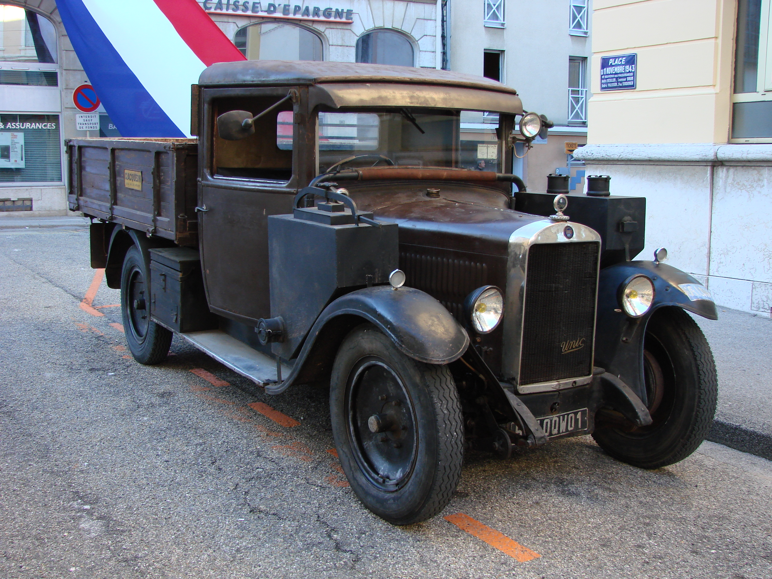 Camion Unic équipé d'un gazogène à la cérémonie du 70e anniversaire du défilé du 11 novembre 1943 à Oyonnax.